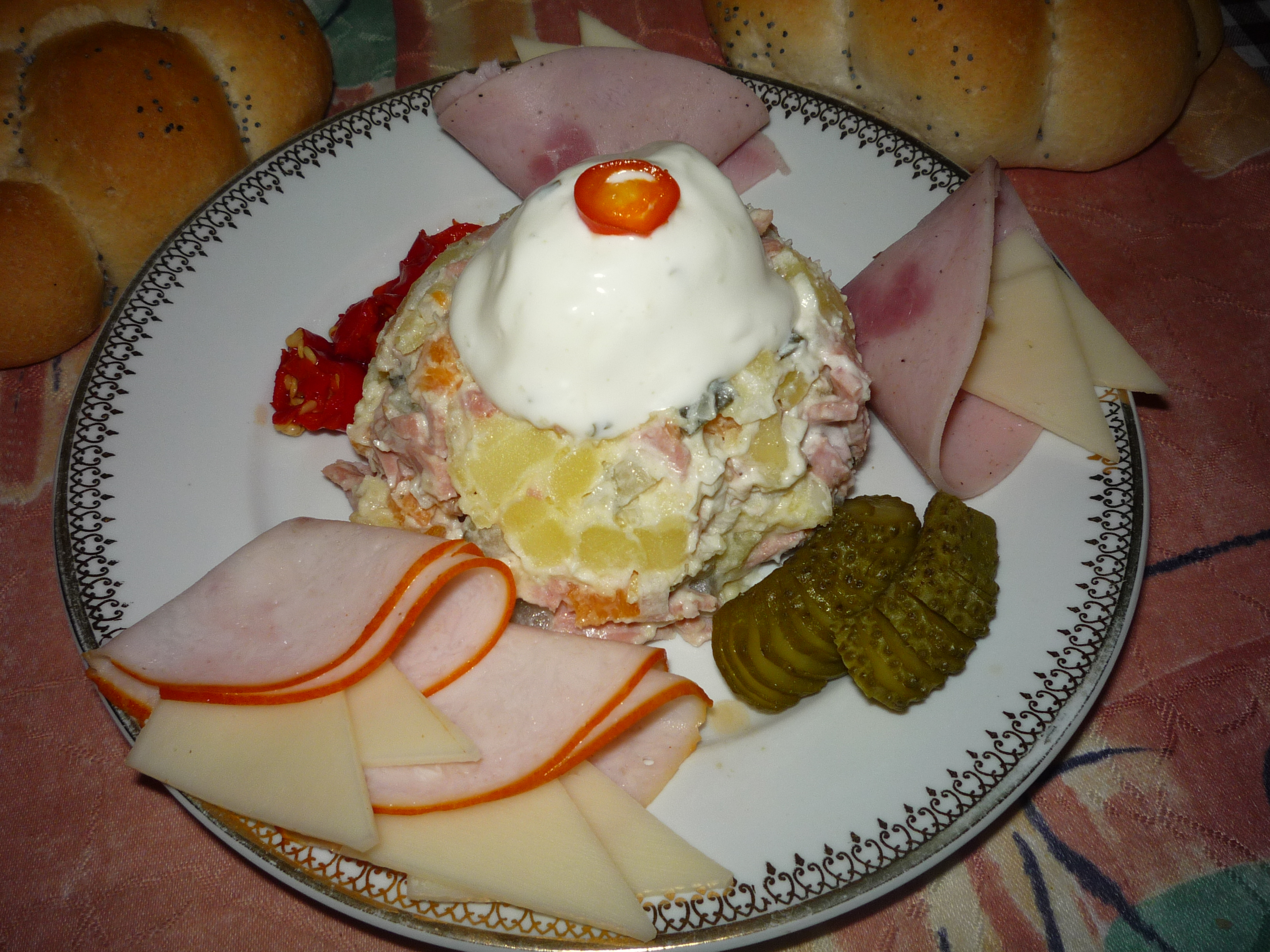 Autor fotografie Jiří Zelenka. Ruské vejce - originální receptura z roku 1962. ČSN 50201. Základem je kopeček vlašského salátu s půlkou vařeného vejce přelitého majonézovým přelivem ozdobeným kaviárem a snítkou zelené petržele. Salát se obložil kornoutkem salámu, vějířkem okurky a plátkem rajčete. V ČSSR bylo ruské vajíčko připravené v nízkém plastovém kelímku. V restauracích bylo ruské vejce připravené na dezertním talířku. Vhodná příloha bílé pečivo nebo chléb. Czech Republic.